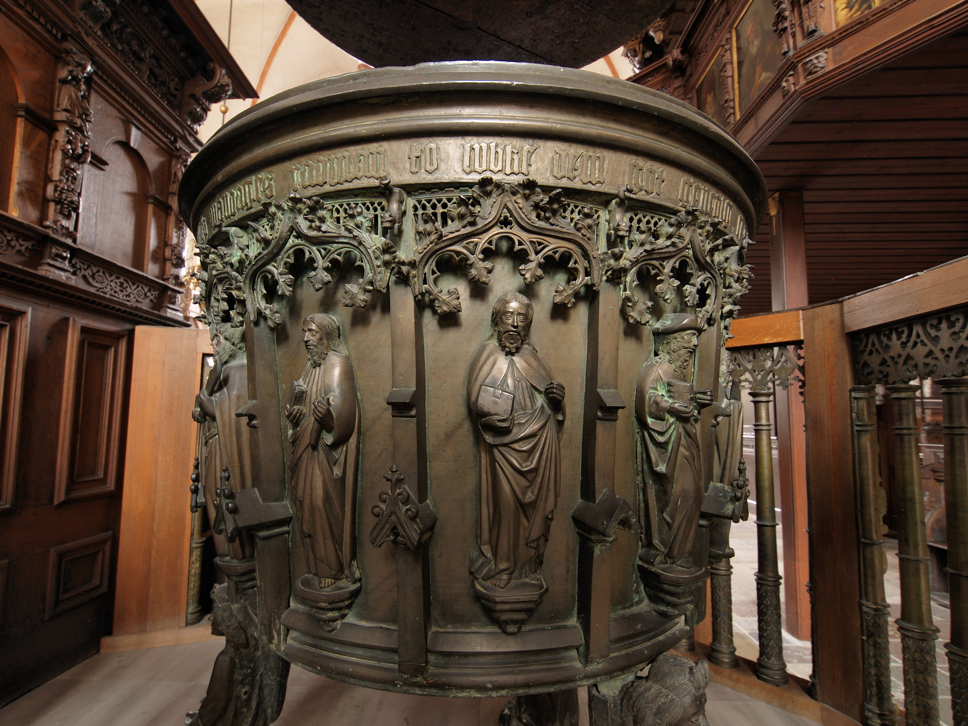 Das Taufbecken in der Jakobikirche in Lübeck